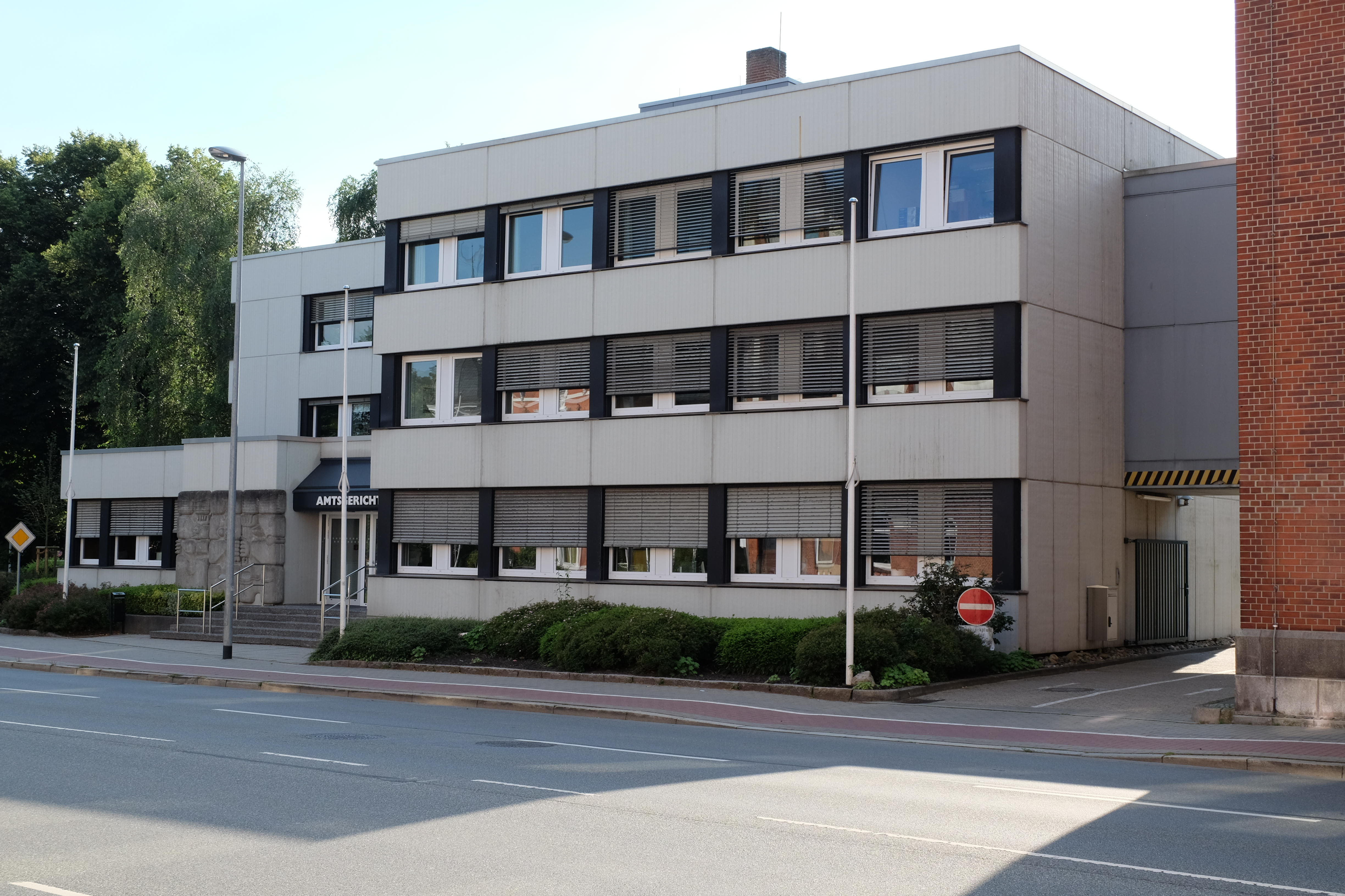 Königstraße 17, Amtsgericht Rendsburg, Neubau